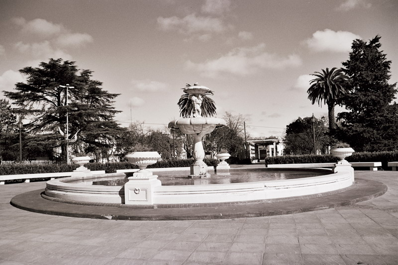 Plaza 25 de Mayo, Bragado, Buenos Aires Fotografo: Juan Azcurra